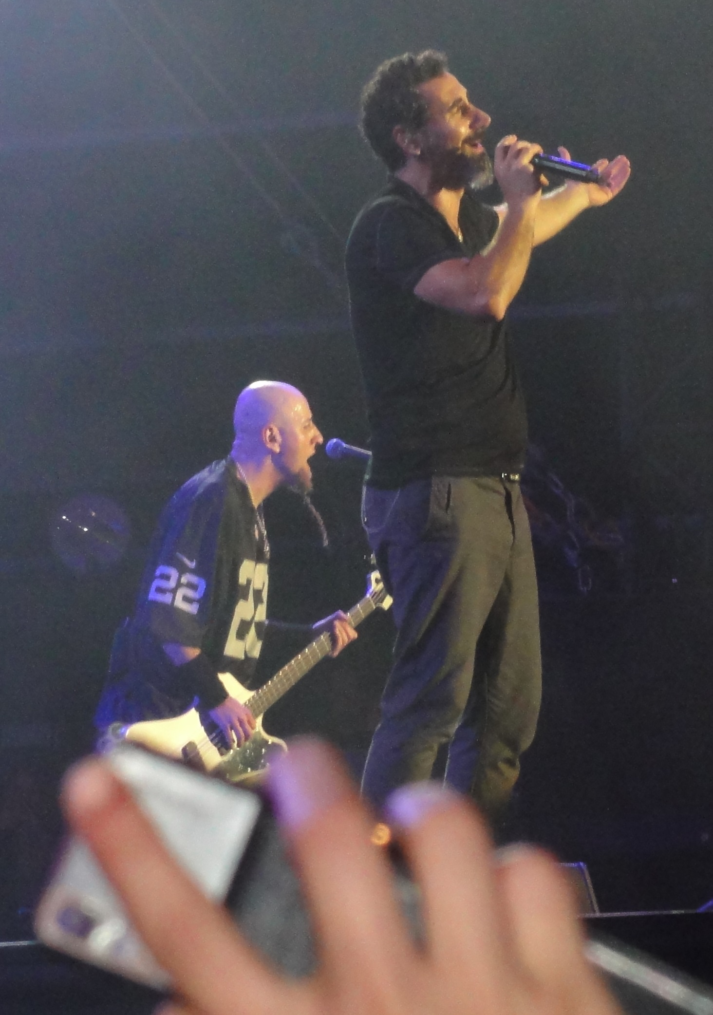 Rock en Seine